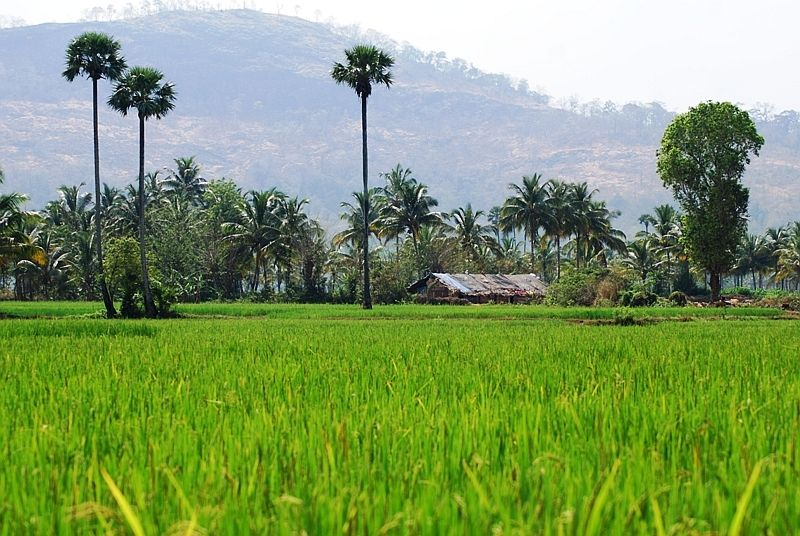 Paddy fields in Nemmara village, Kerala